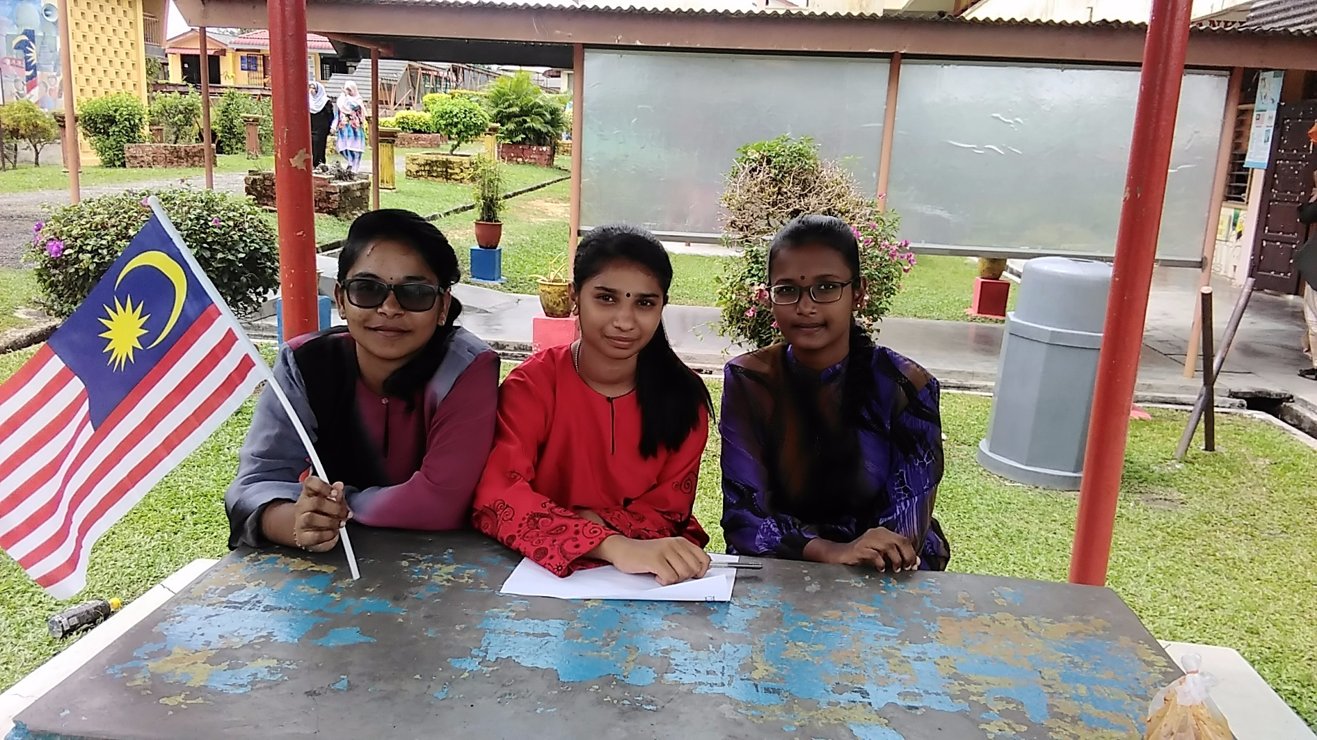 Malaysia Tetap Dihati